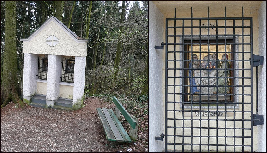 Kreuzweg auf den Pöstlingberg